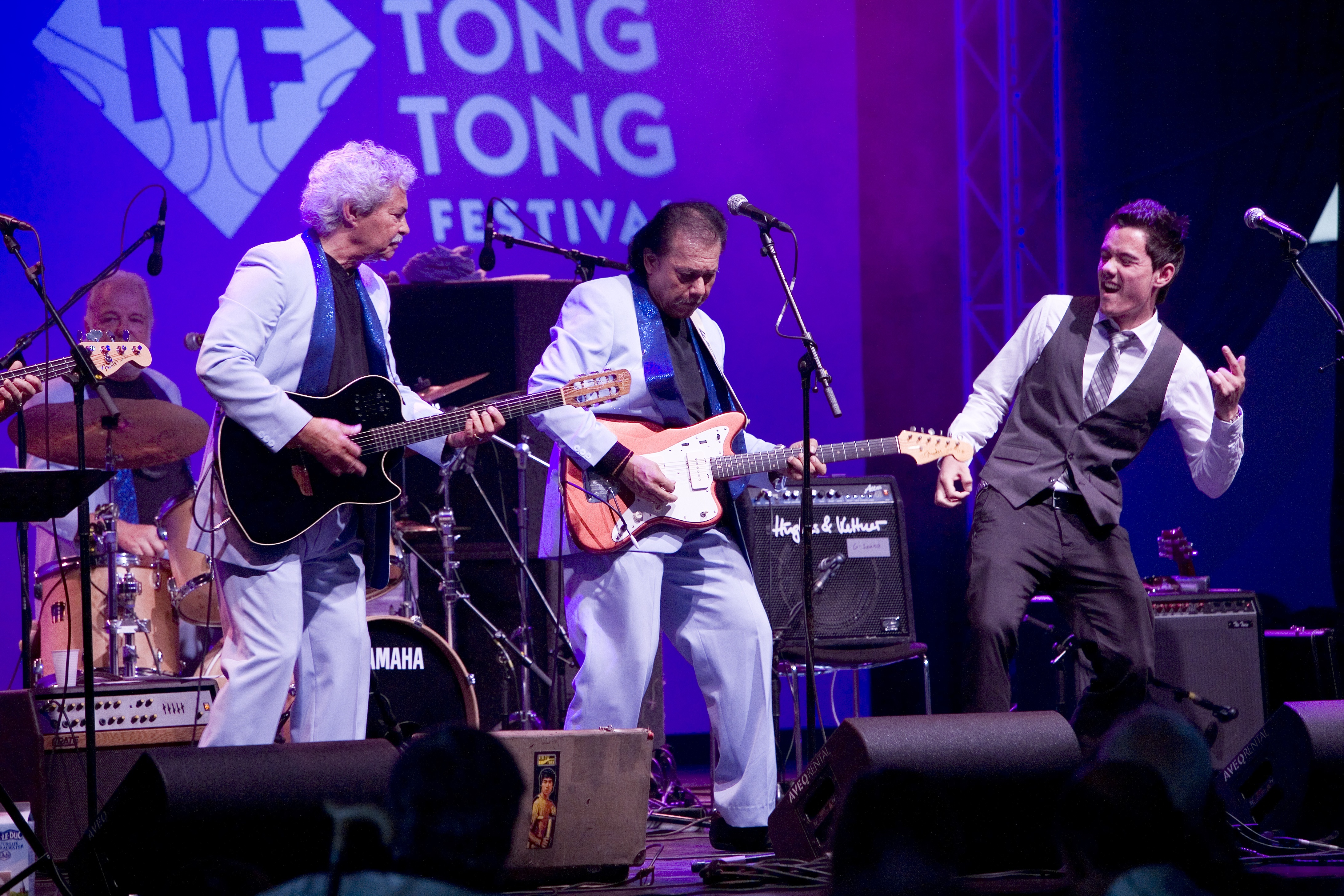 Geen wereldmuziek zoals de definitie vandaag de dag luidt, maar wel werelds en wereldschokkend was de introductie van de rock-‘n-roll in Nederland door de Tielman Brothers. Indische jongens rockten en hun stijl werd een genre: Indorock. Op de 55e Tong Tong Fair treden de nog immer actieve Crazy Rockers op, met speciale gasten Rinus Gerritsen en George Kooymans van The Golden Earring. Indorock meets Nederpop.